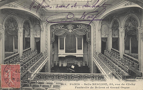 Salle Berlioz, 55 rue de Clichy, Paris 9ème (aujourd'hui le Théatre de l'Œuvre)